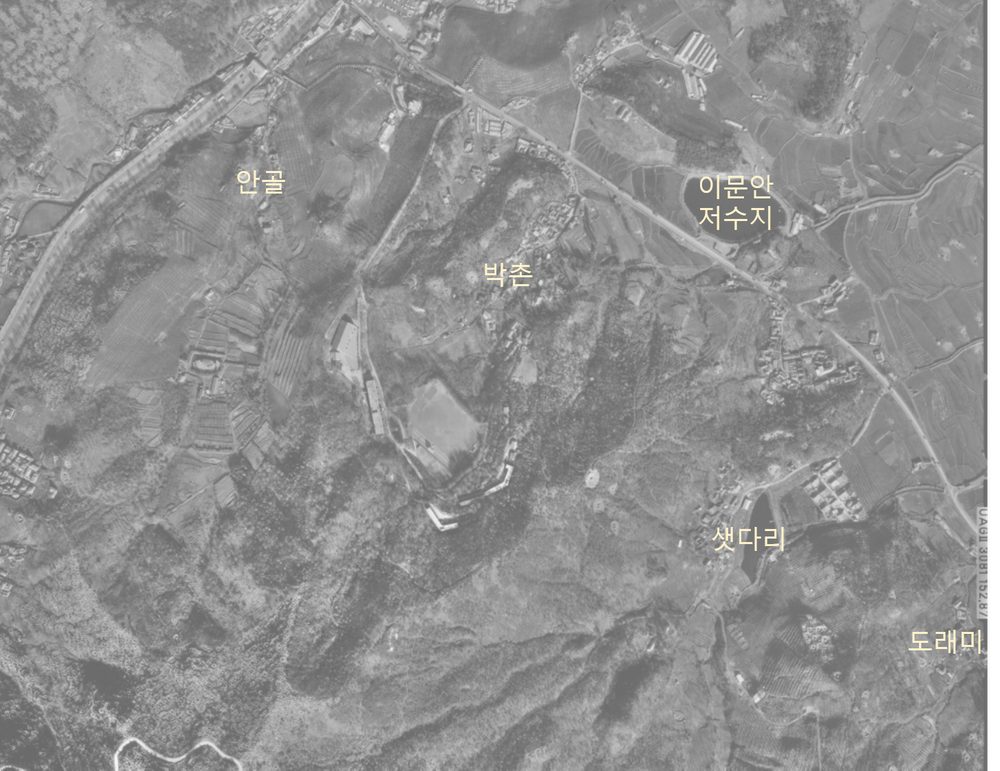 이문리, 안골, 교문동, 백교, 한다리마을